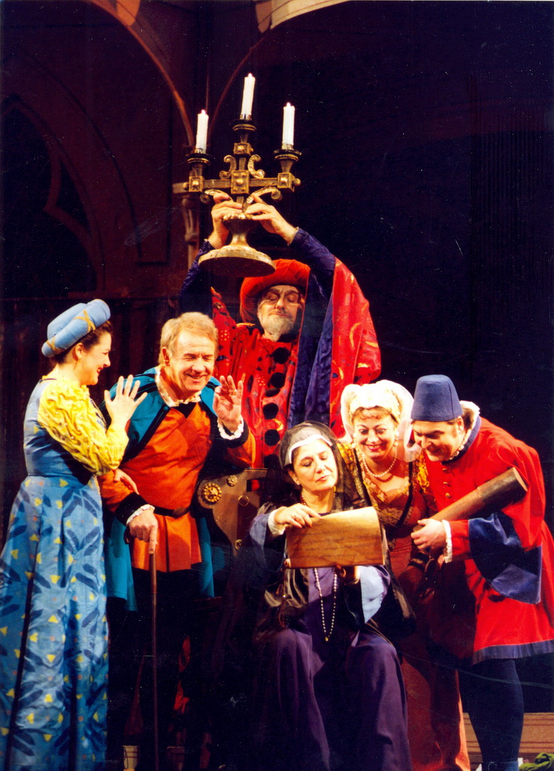 A Gianni Schicchi című előadás a Magyar Állami Operaházban.